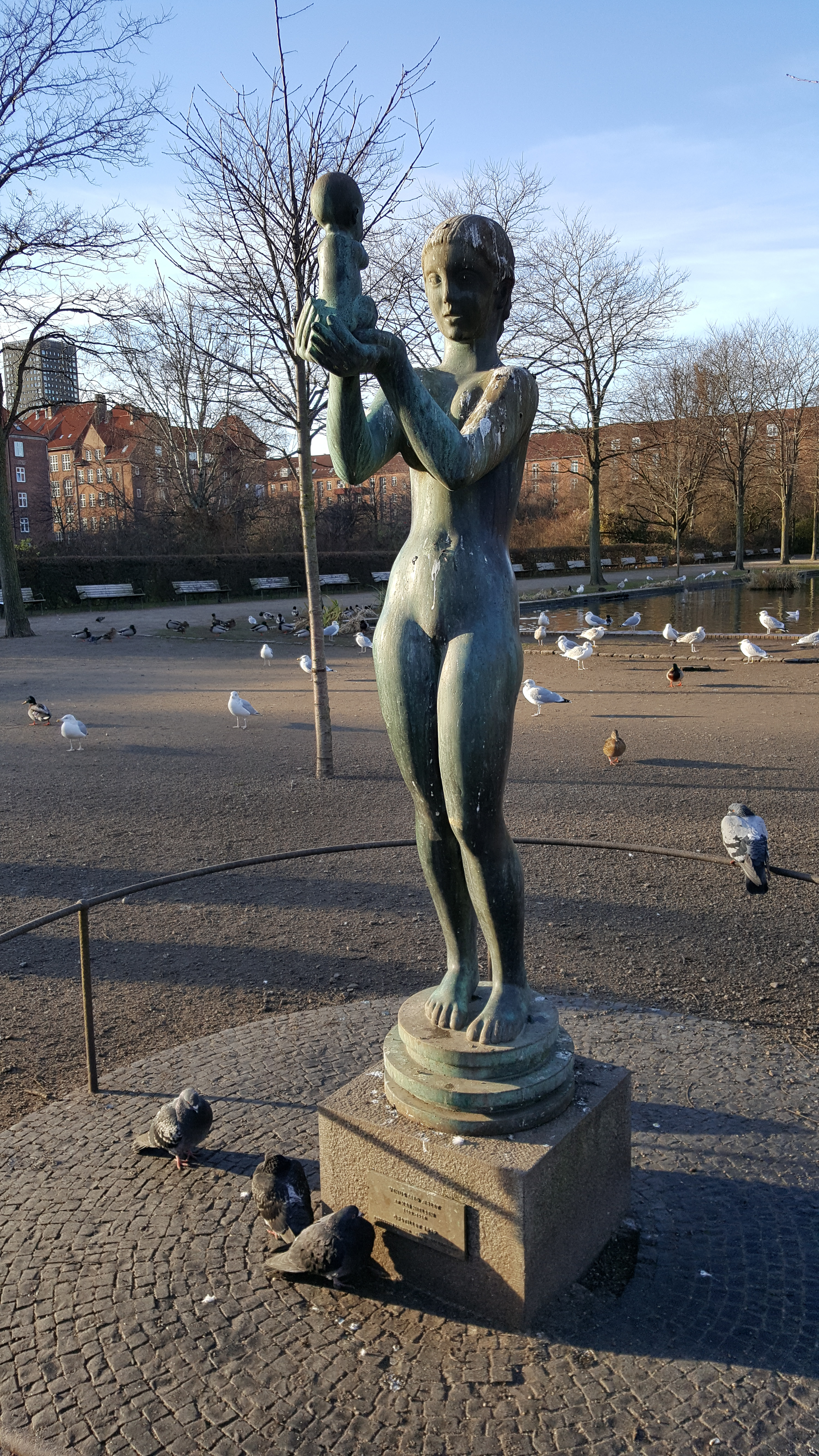 Kay Nielsens bronzeskulptur Venus med æblet